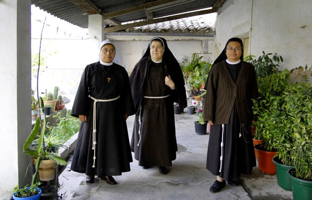 Hermanas del Convento de las Clarisas (Inmaculada Concepción) paseando por el interior